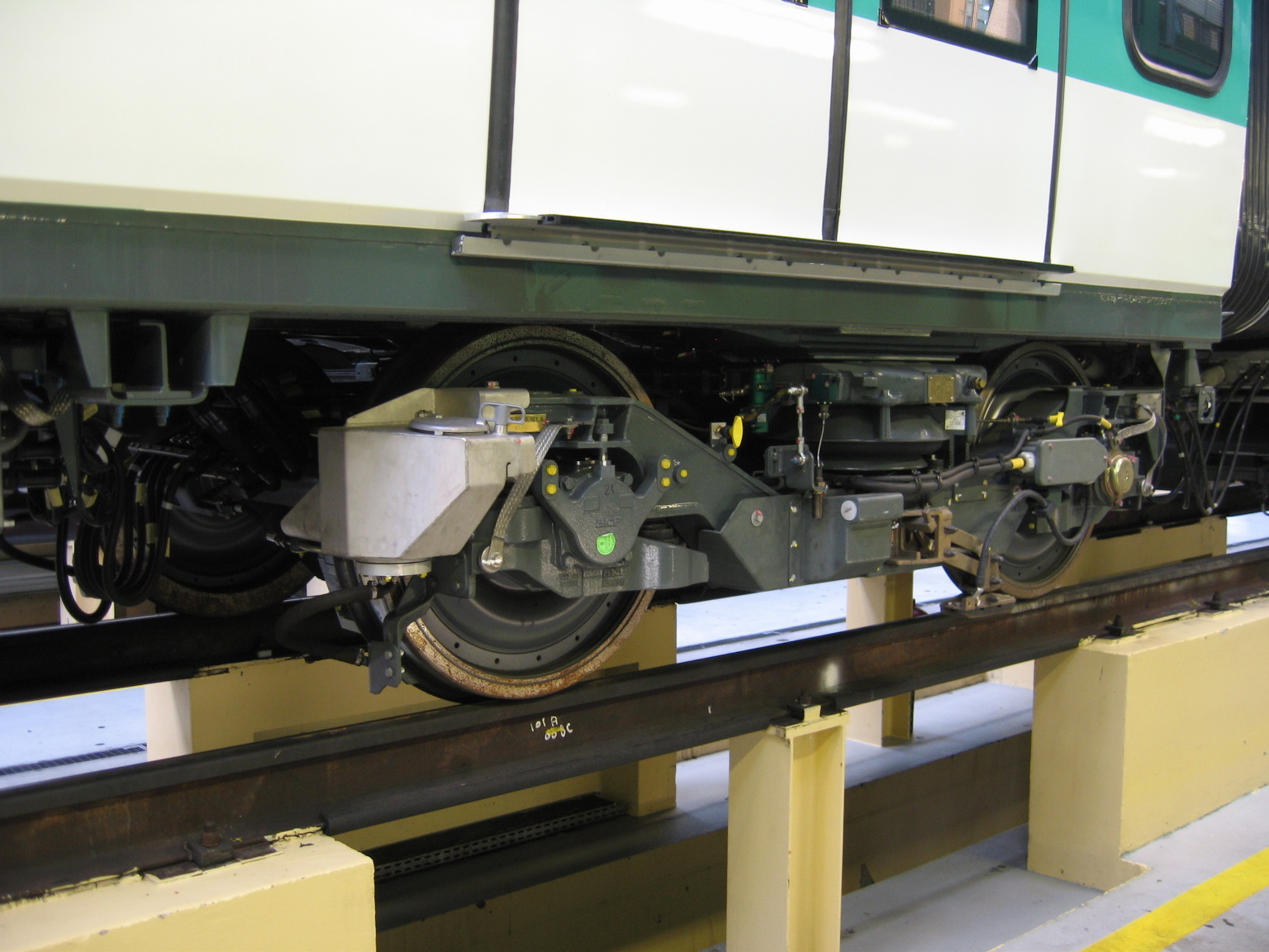 Bogie de MF 88. JPO Atelier de Bobigny 24/05/2008.